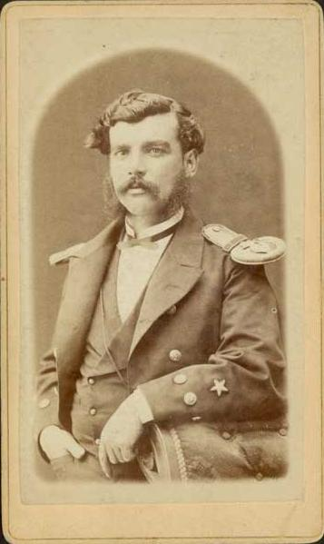 Ignacio Serrano Montaner (*Melipilla, Chile, 1846 - † a bordo del monitor Huáscar en Iquique, Perú, 21 de mayo de 1879), marino chileno